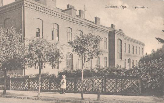 Gimnazjum w Giżycku w 1911Gymnasium von Lötzen